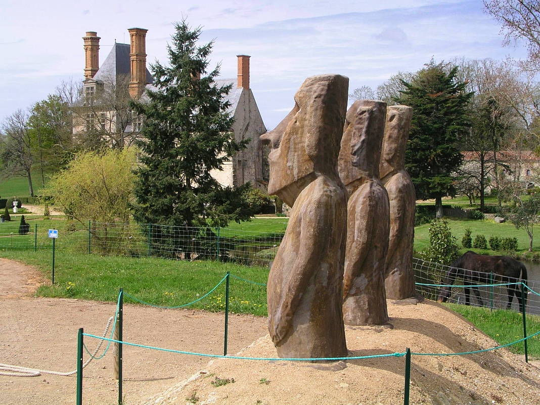 Avrillé; Chateau de la Guignardière